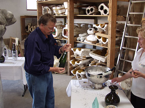 Prof. Eberhard Linke. Eigenes Foto K.H.Jungk, Flonheim